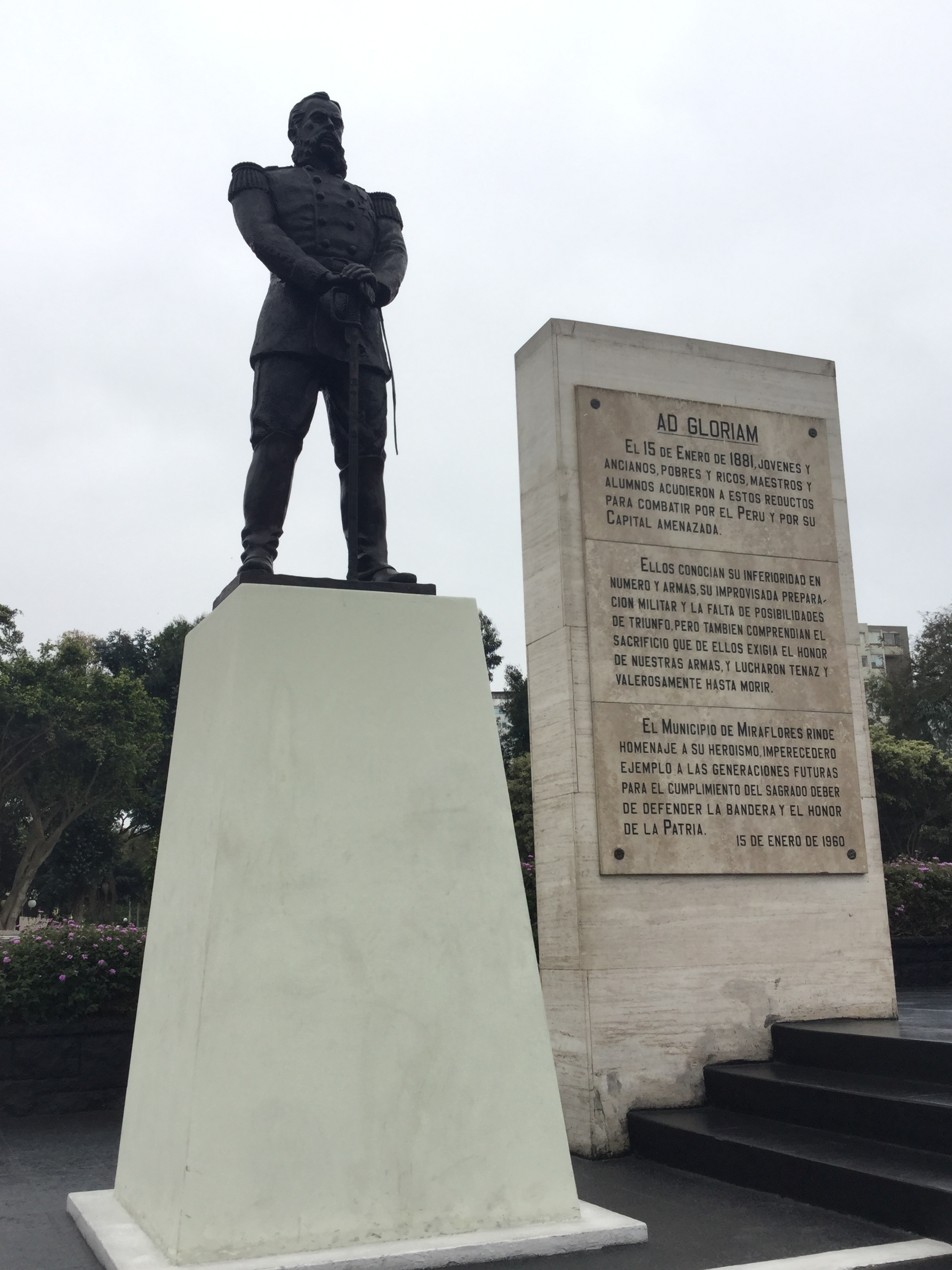 El municipio de Miraflores rinde homenajes a los jóvenes , ancianos, pobres, ricos que acudieron a estos reductos para constipe por el Peru.